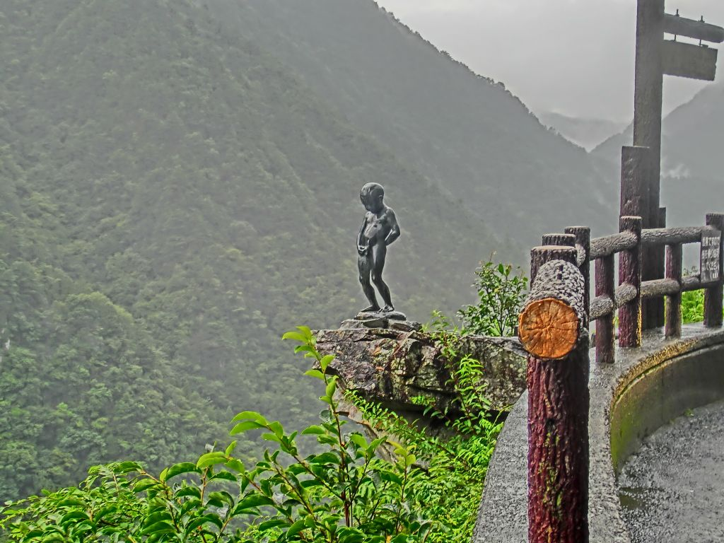 小便小僧の像。徳島県祖谷渓